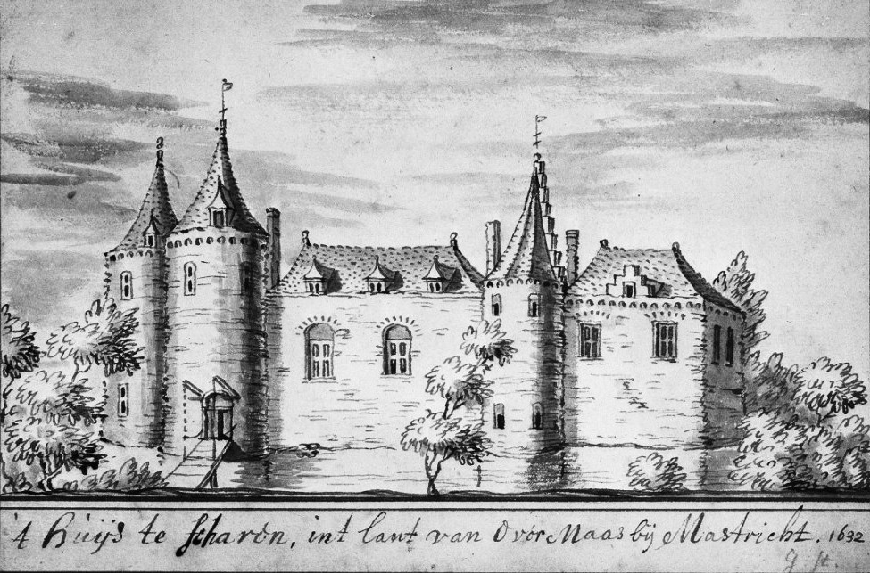 Kasteel: exterieur